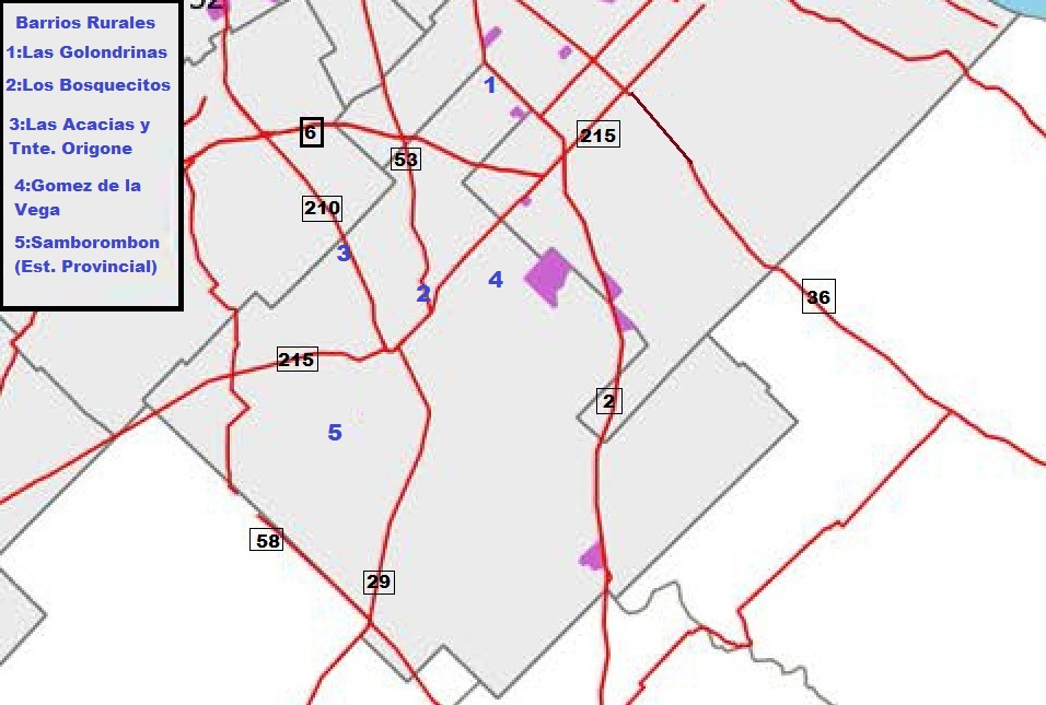 Barrios Rurales